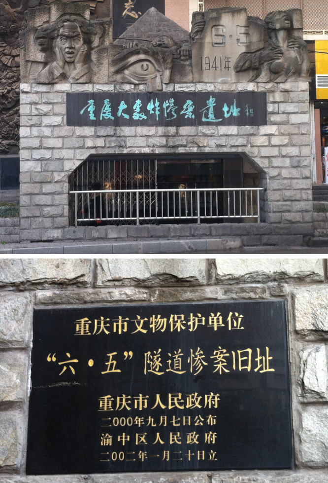 亦称作“六·五”隧道惨案旧址